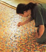 Portrét Petra Kvíčaly